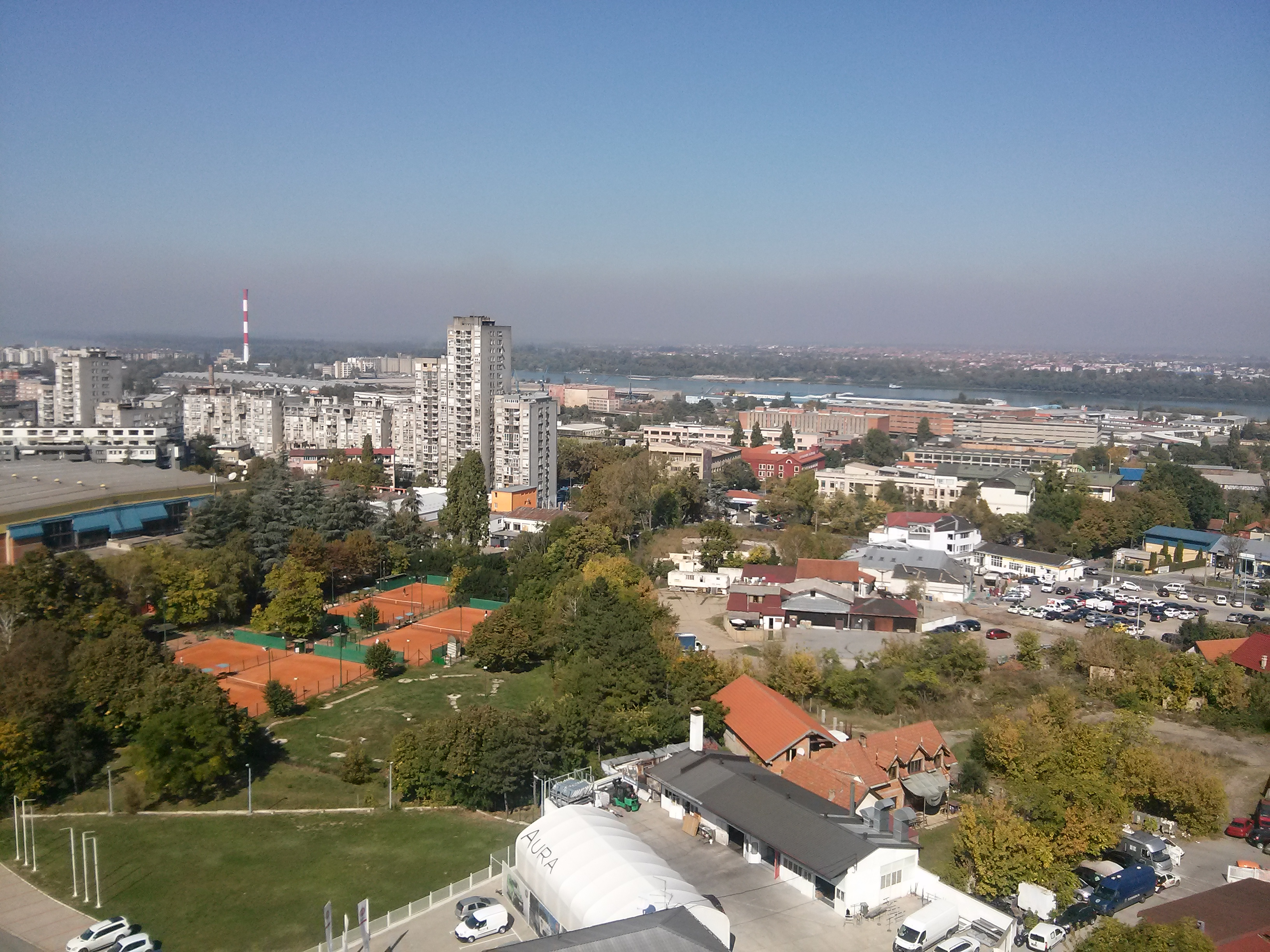 Srpski (latinica): Karaburma